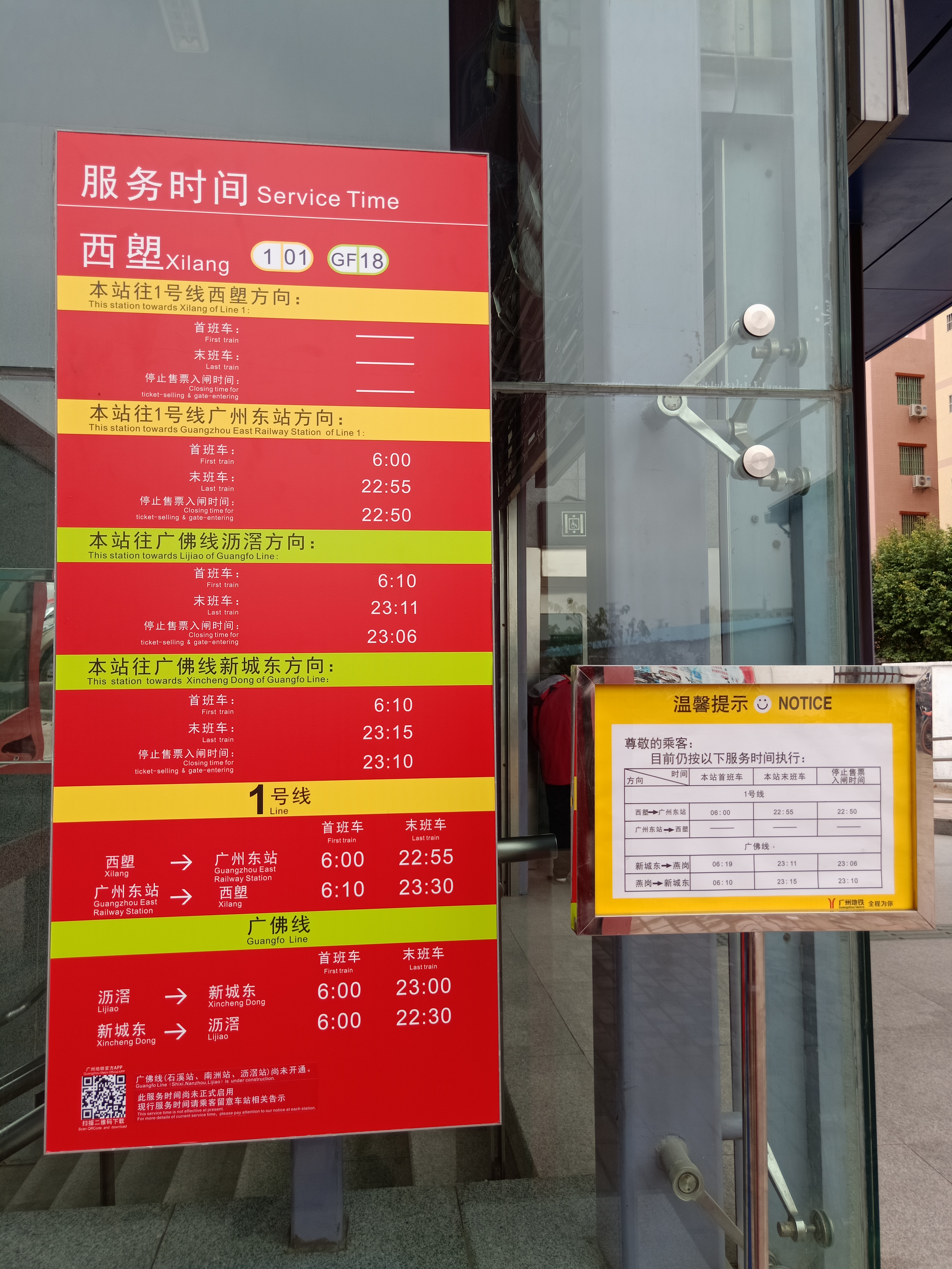 粵語: 2018年12月24號，西塱站嘅J出入口隔籬嚿玻璃張塑膠黐紙，入面明顯發現原先「西朗」兩字變咗「西塱」。